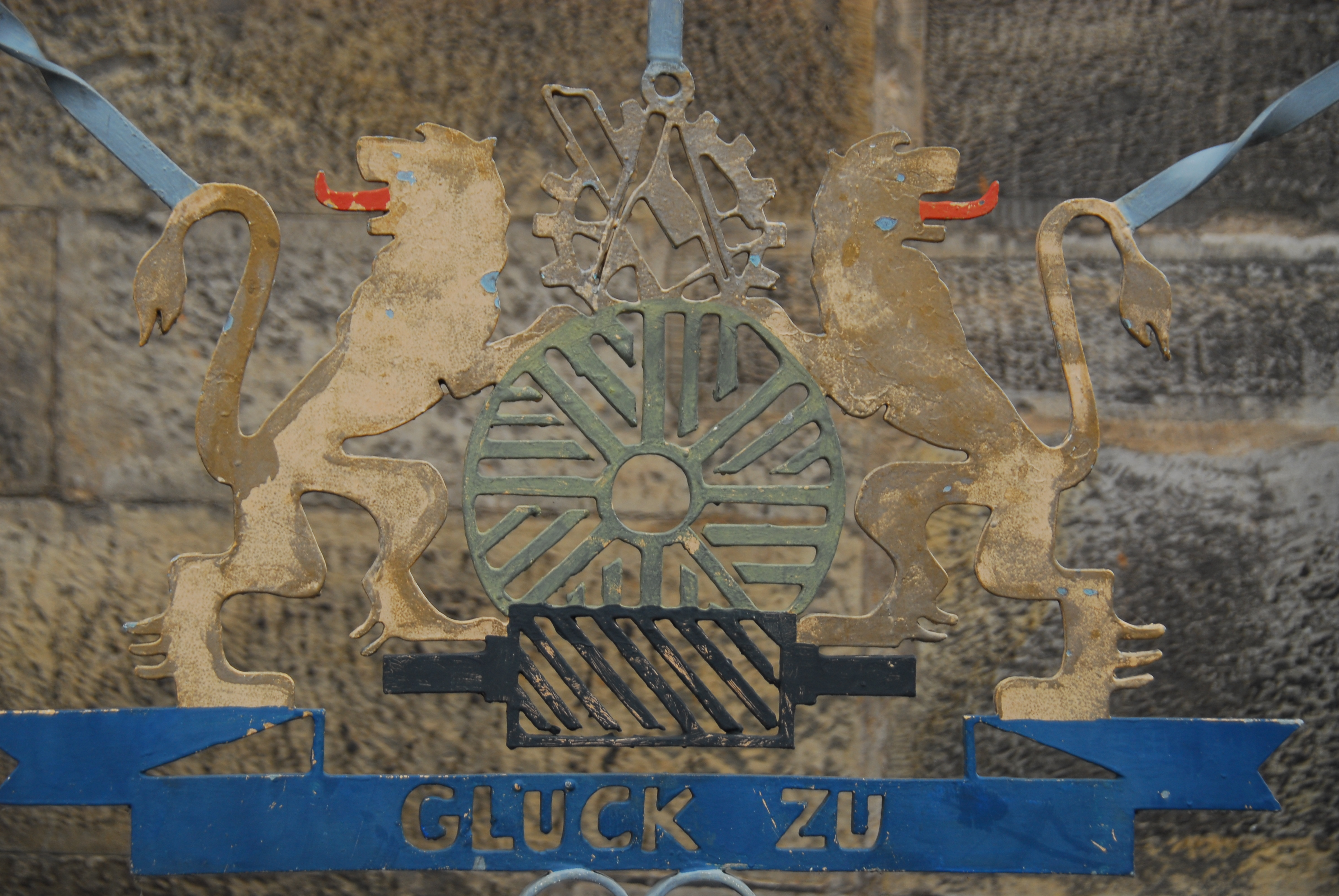 metalboard at a former watermill, Wennigsen